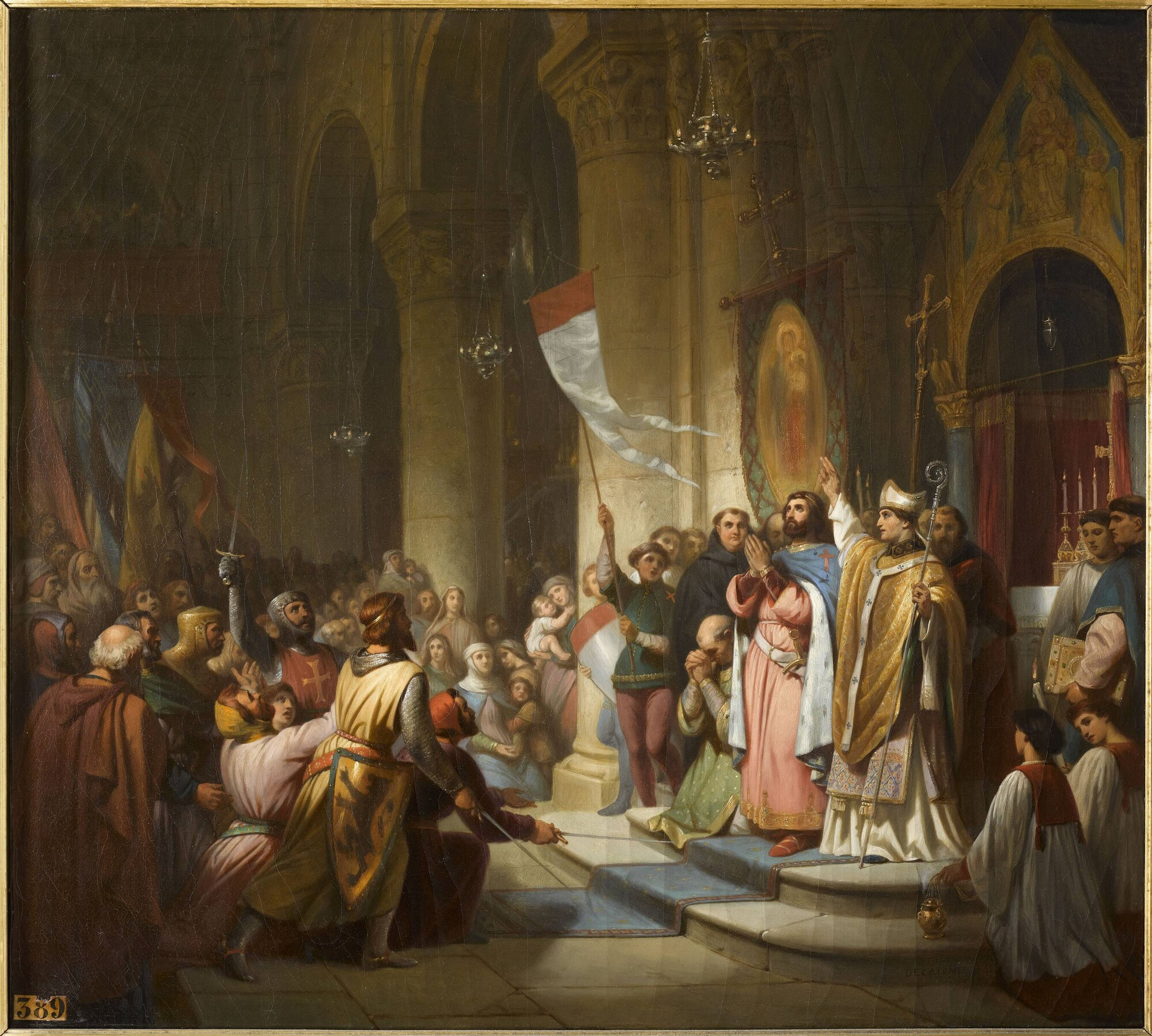 Bonifaz wird in Soissons 1201 zum Kreuzzugsführer gewählt